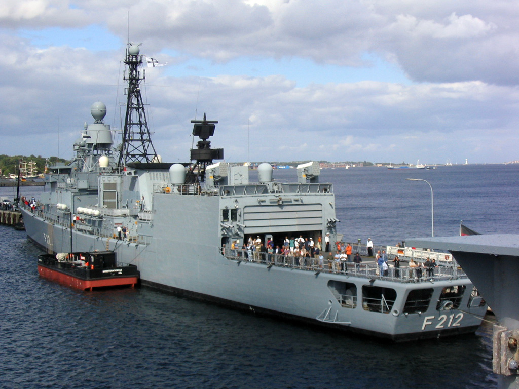 Fregatte Karlsruhe F212 im Kieler Hafen